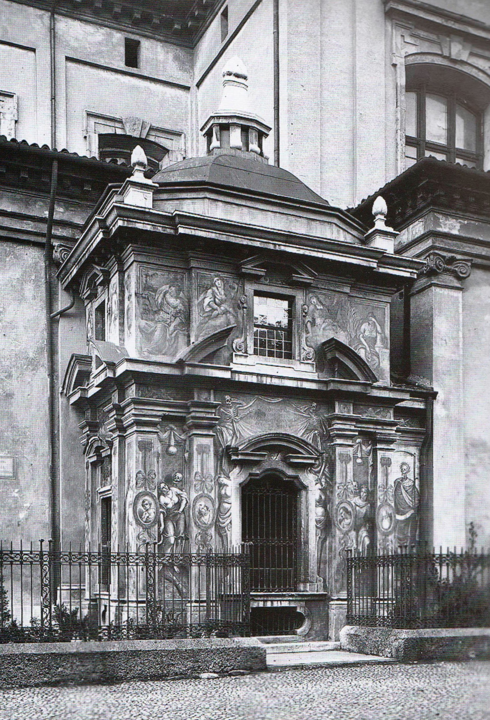 Il mortorio della basilica di San Giovanni Battista di Busto Arsizio prima che venissero asportati gli affreschi decorativi delle pareti esterne, oggi conservati presso la chiesa di San Gregorio Magno in Camposanto.